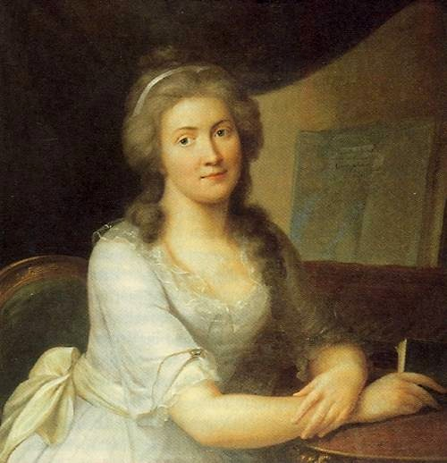 Charlotte von Kalb (1761-1843). Ölgemälde im Wittumspalais Weimar. Die Freundin Schillers, die während Goethes Abwesenheit in Weimar eingetroffen war, um Schiller einzuführen, tritt nun auch in Goethes Gesichtskreis. Obwohl dem Herderischen Kreise nahestehend, später Jean Paul verbunden, stand die seltsame schwergeprüfte Frau auch mit Goethe in freundschaftlichen Beziehungen.